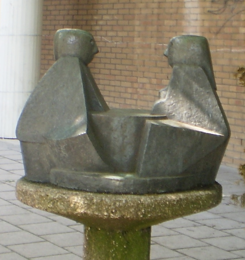 'Praatje' van Henk van de Vis. In 1974 kreeg hij de opdracht om dit beeld te maken voor de Kennedy Mavo. Deze school zat in het gebouw van wat nu het Poorthuis is en in 2020 deels in gebruik is door de St. Aloysiusschool. Ergens in 1995 werd deze mavo gesloten. Het beeld is na de sluiting van de mavo verplaatst naar het plein van de St. Aloysiusschool.